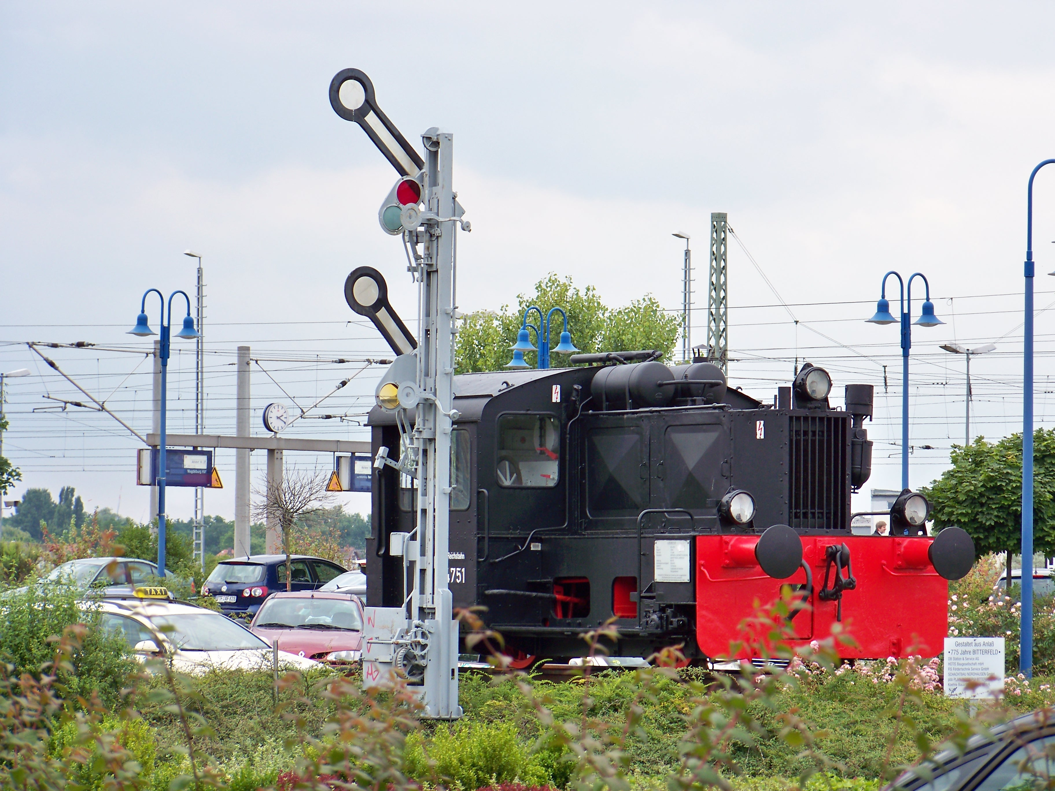 Auf dem Bahnhofsvorplatz in Bitterfeld ausgestellte Lokomotive